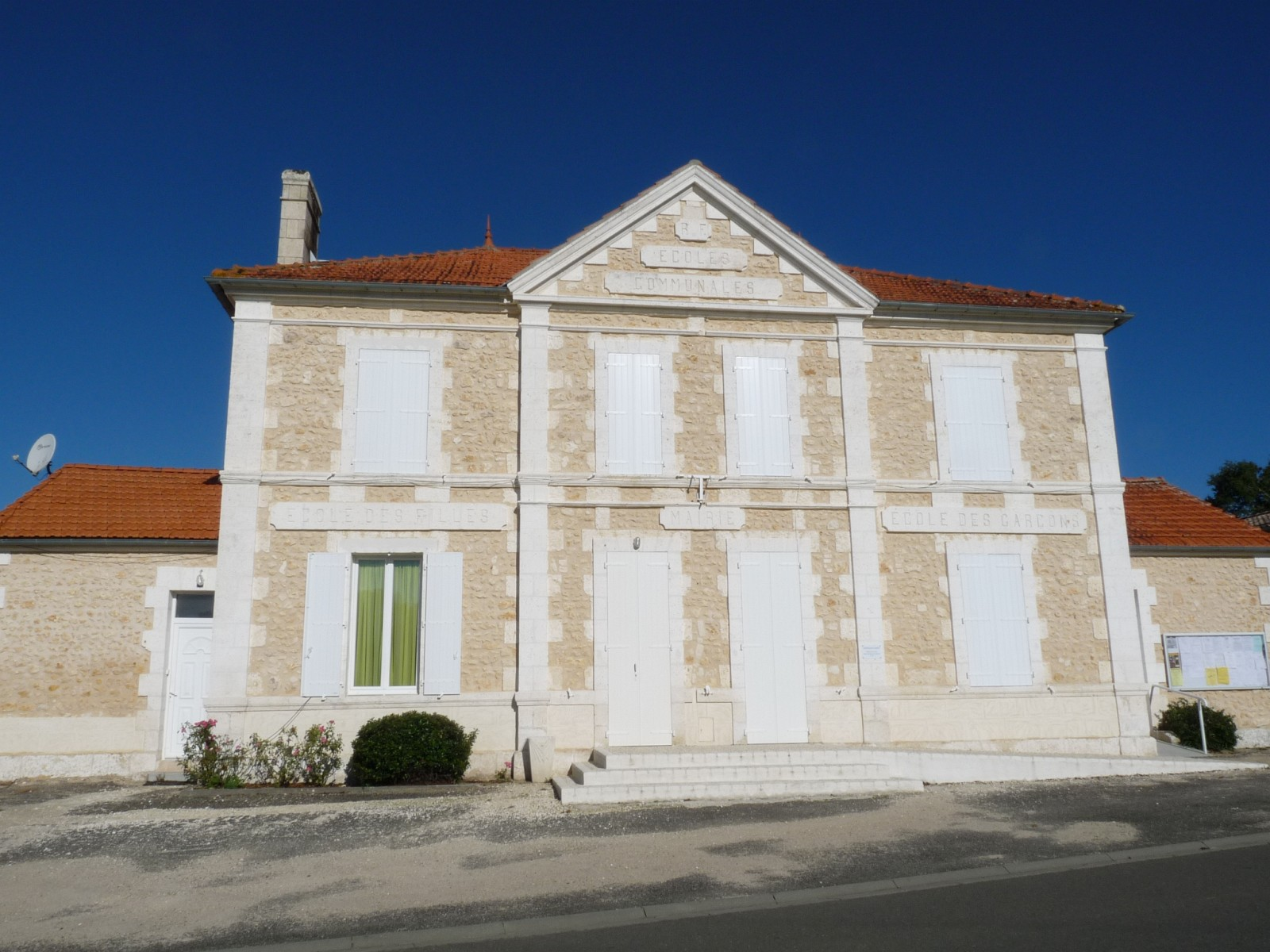 Mairie de Neuvicq, Charente-Maritime, France